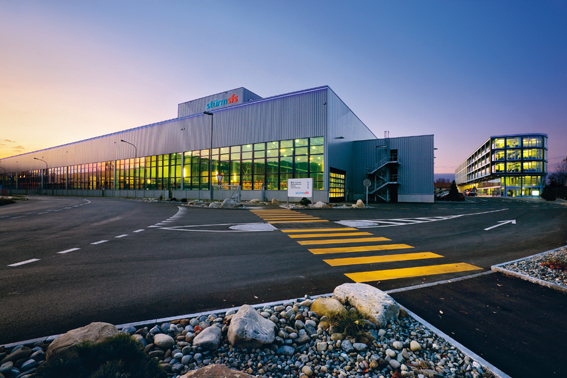 Hauptsitz